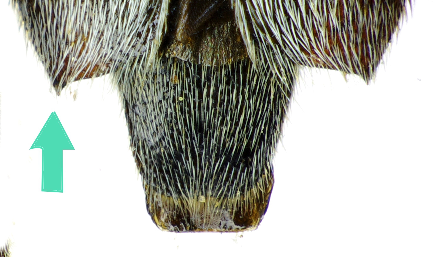 Chlorophorus figuratus, Körperende von oben. Blauer Pfeil: Zahn am Außenwinkel der Flügeldecke Studioaufnahme, Exemplar aus eigener Sammlung